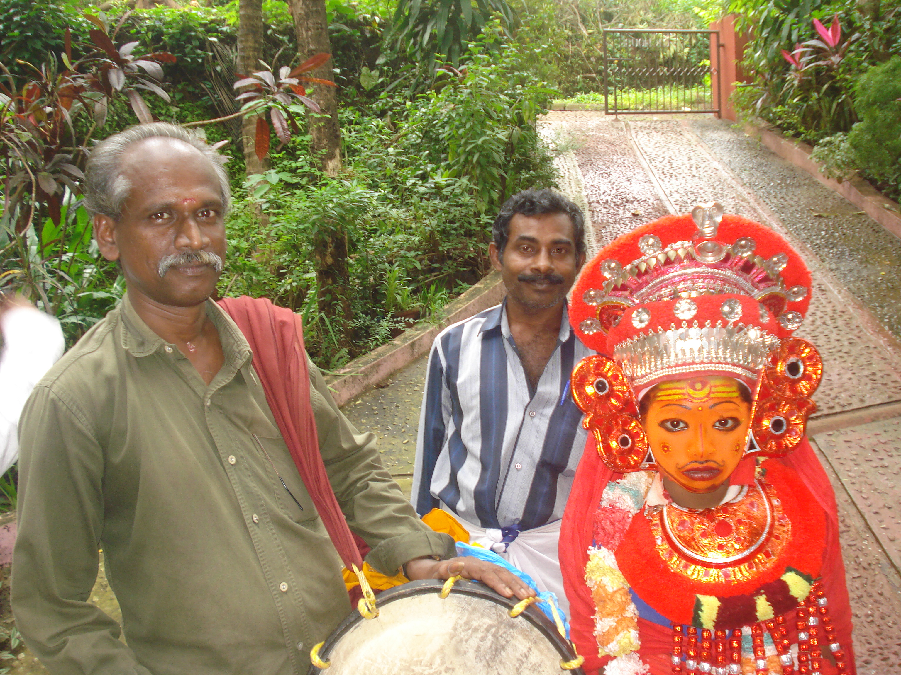 ഉത്തര മലബാറിലെ വീടുകളില്‍ കര്‍ക്കിടകത്തിലെ ആദ്യ ദിനങ്ങളില്‍ കുട്ടികള്‍ വേടന്‍ കെട്ടി വരുന്നു. ഒപ്പം ചെണ്ടക്കാരനും സഹായിയും കാണും. കര്‍ക്കിടക ദുരന്തങ്ങള്‍ ഒഴിവാക്കന്‍ ഇവരുടെ വരവ് സഹായിക്കും എന്ന് പറയപ്പെടുന്നു. പ്രാദേശികമായ ഇത്തരം ആചാരങ്ങള്‍ ഇന്നും ചില സ്ഥലങ്ങളില്‍ കാണാം.